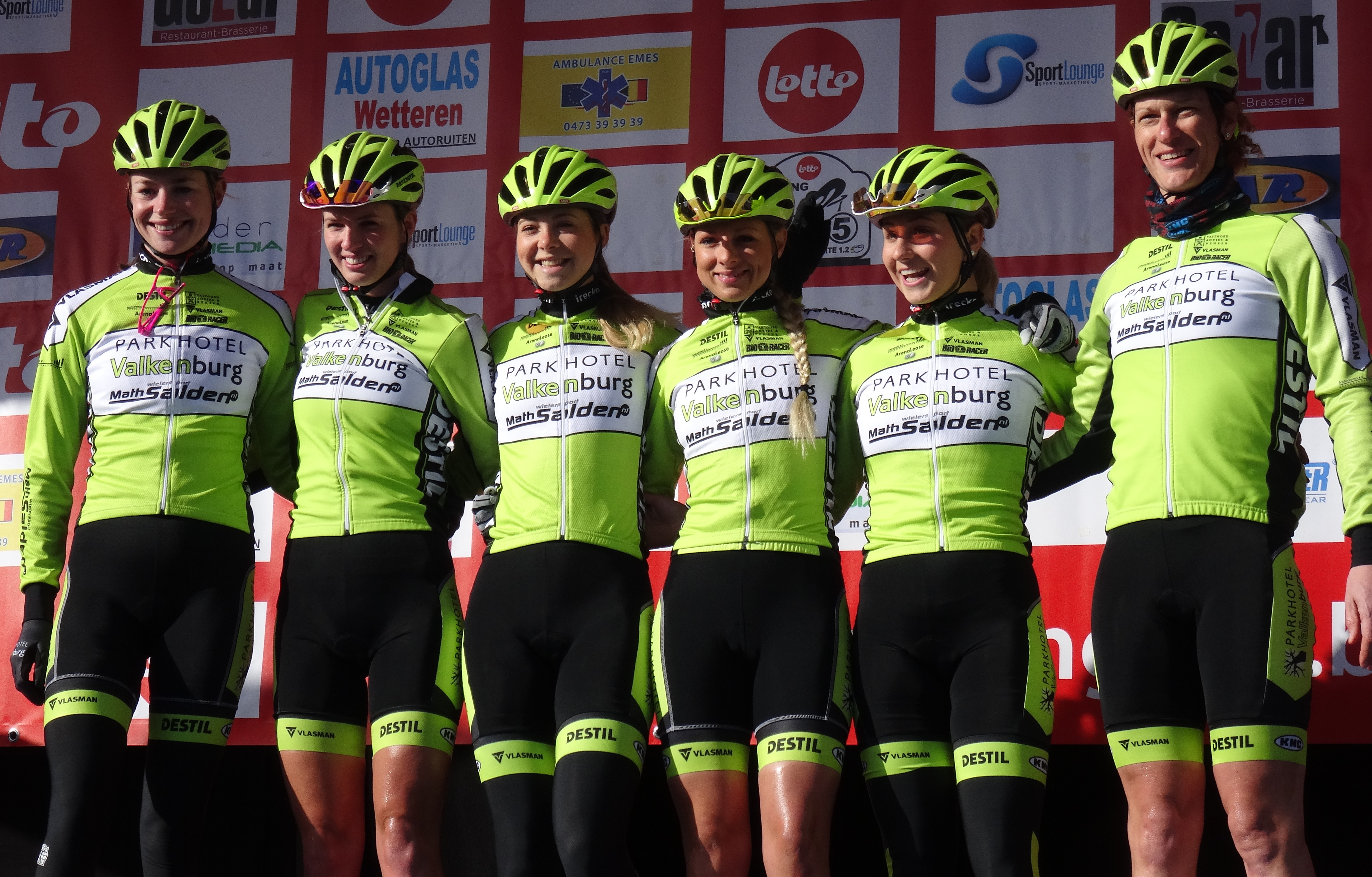 Reportage réalisé le mercredi 4 mars à l'occasion du départ du Samyn des Dames 2015 et du Samyn 2015 à Quaregnon, Belgique.